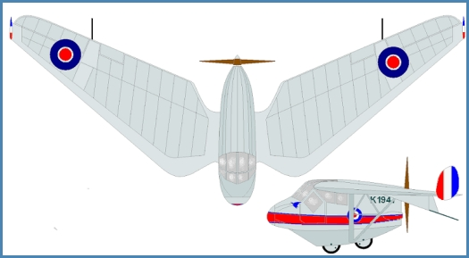 Hill Pterodactylus 4